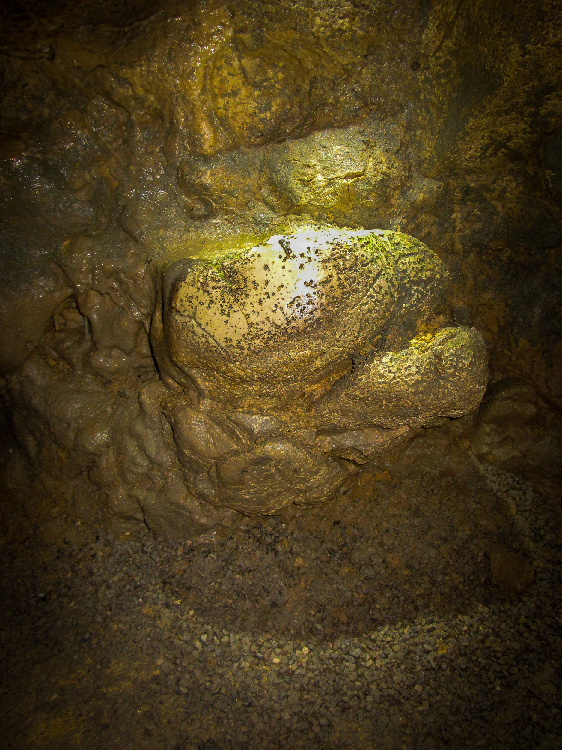 Bärenschliff in der Charlottenhöhle bei Hürben.